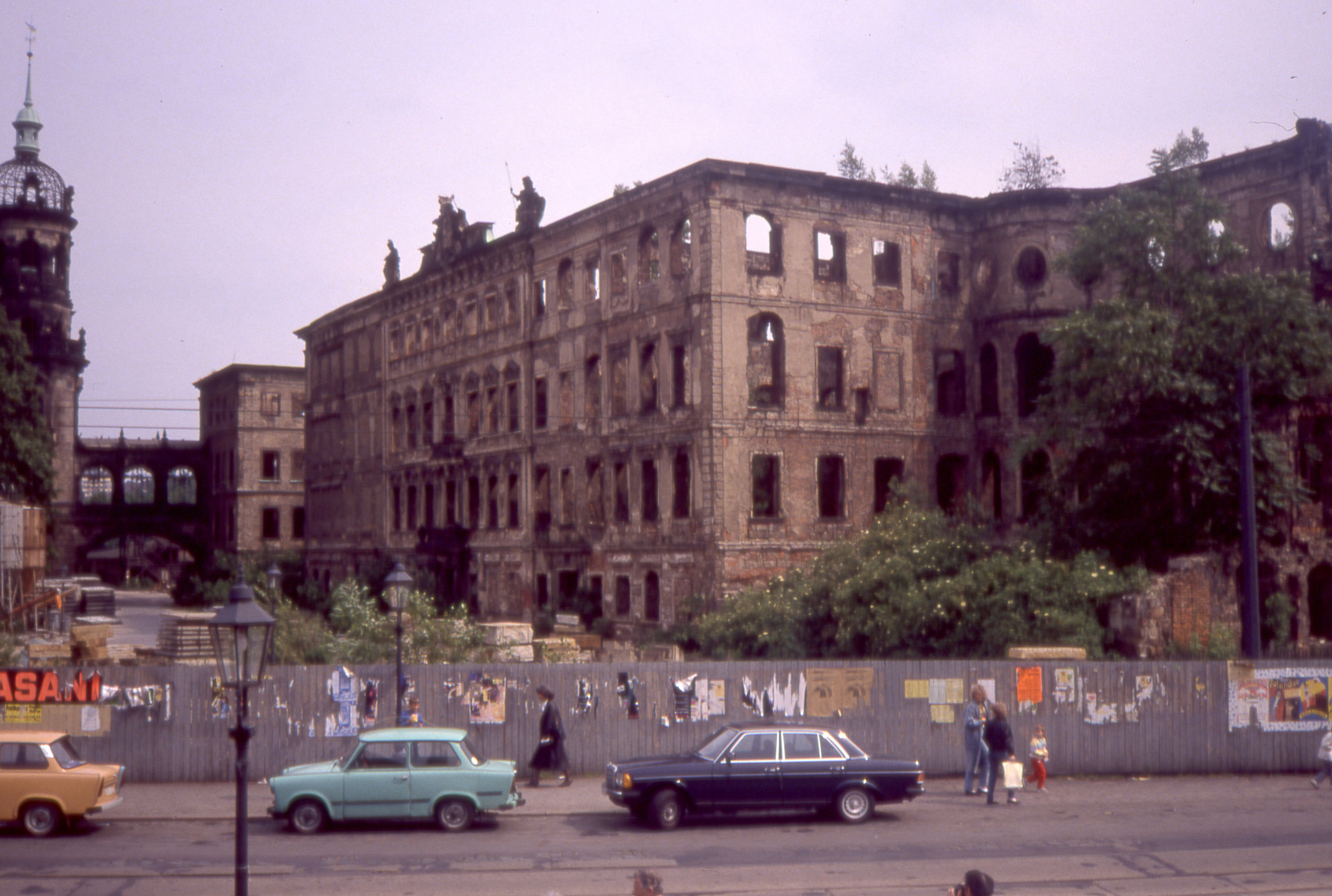 Dresdner Taschenbergpalais 1990